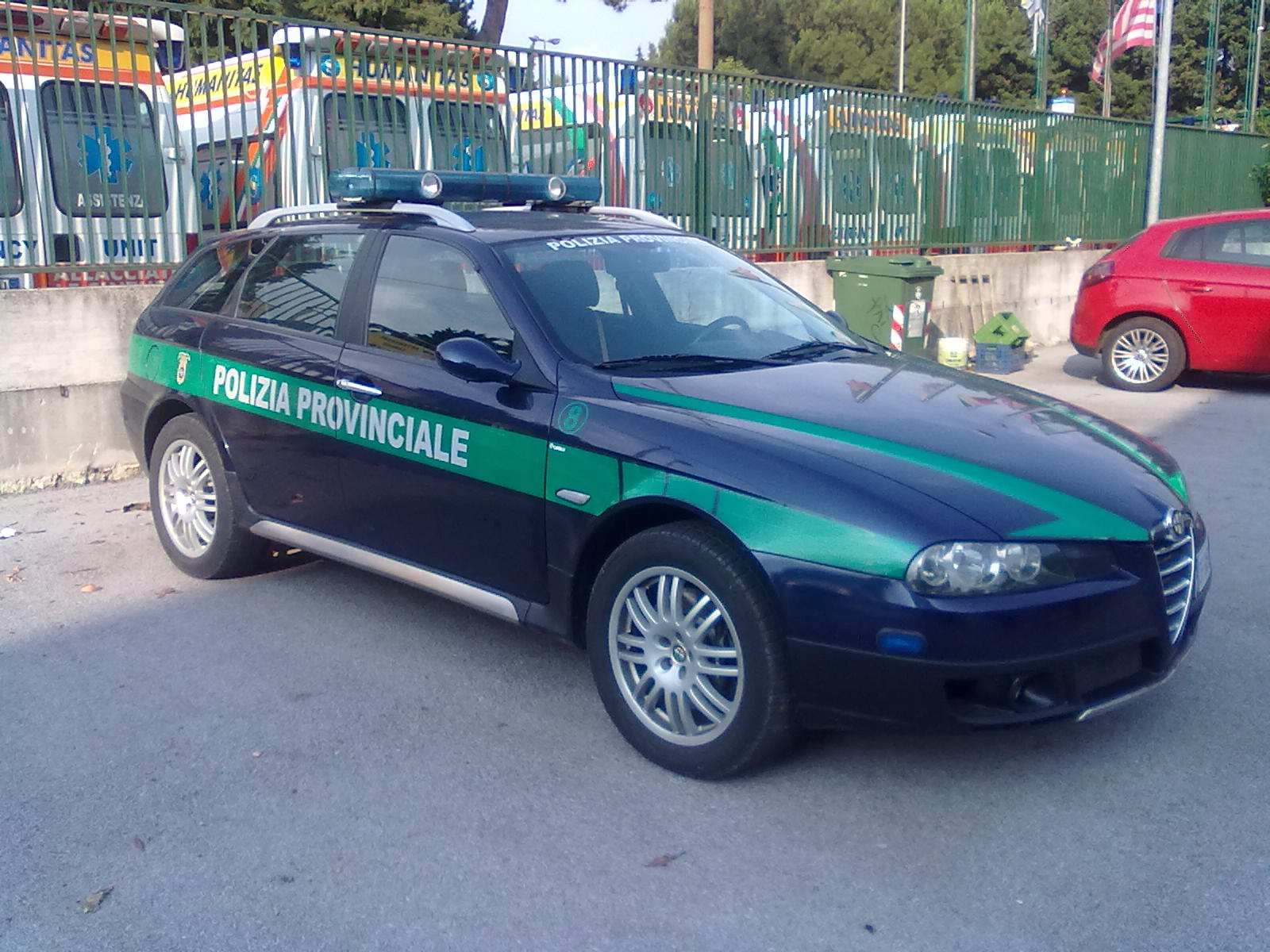 Alfa 156 Crosswagon della Polizia Provinciale di Salerno